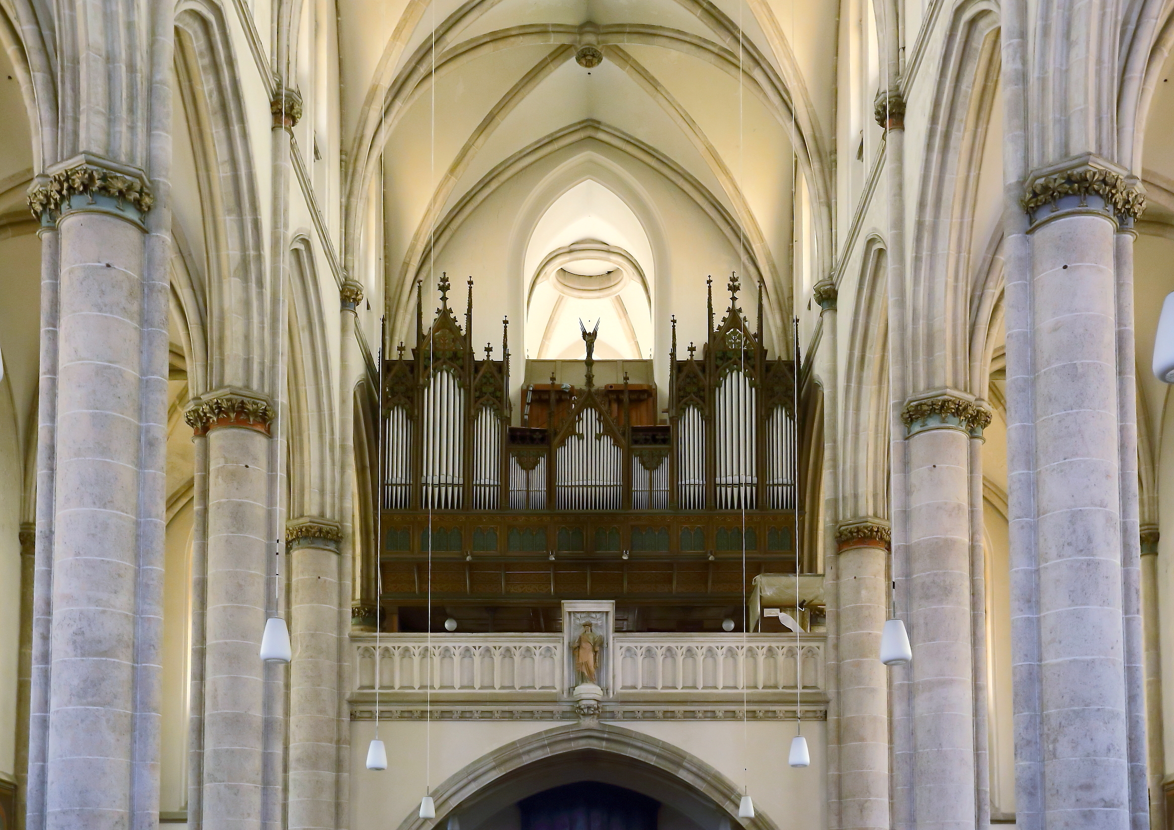 Orgel der Othmarkirche im 3. Wiener Gemeindebezirk. Ursprünglich 1873 von Carl Hesse gefertigt, 1931 baute Johann M. Kauffmann ins alte Gehäuse eine neue Orgel ein.